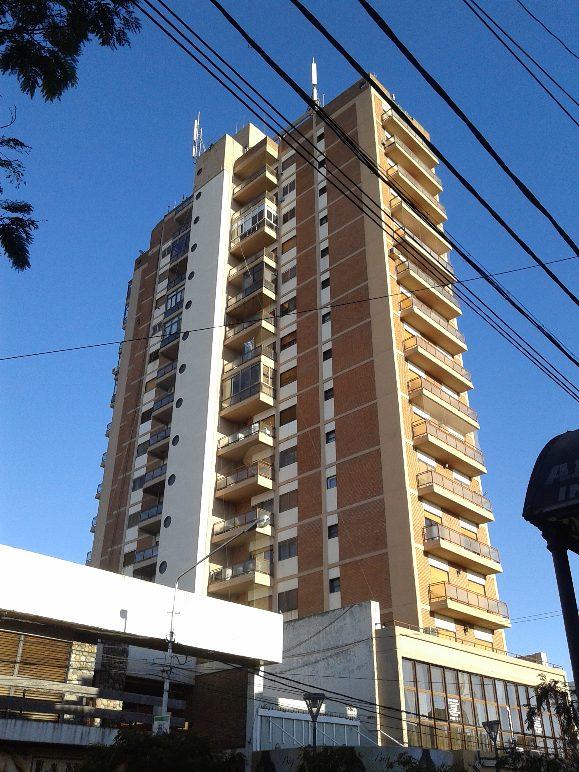 Edificio más alto de la ciudad, 15 pisos de altura ubicado en calle 15 entre 18 y 20. Debajo del mismo cuenta con una galeria de compras.